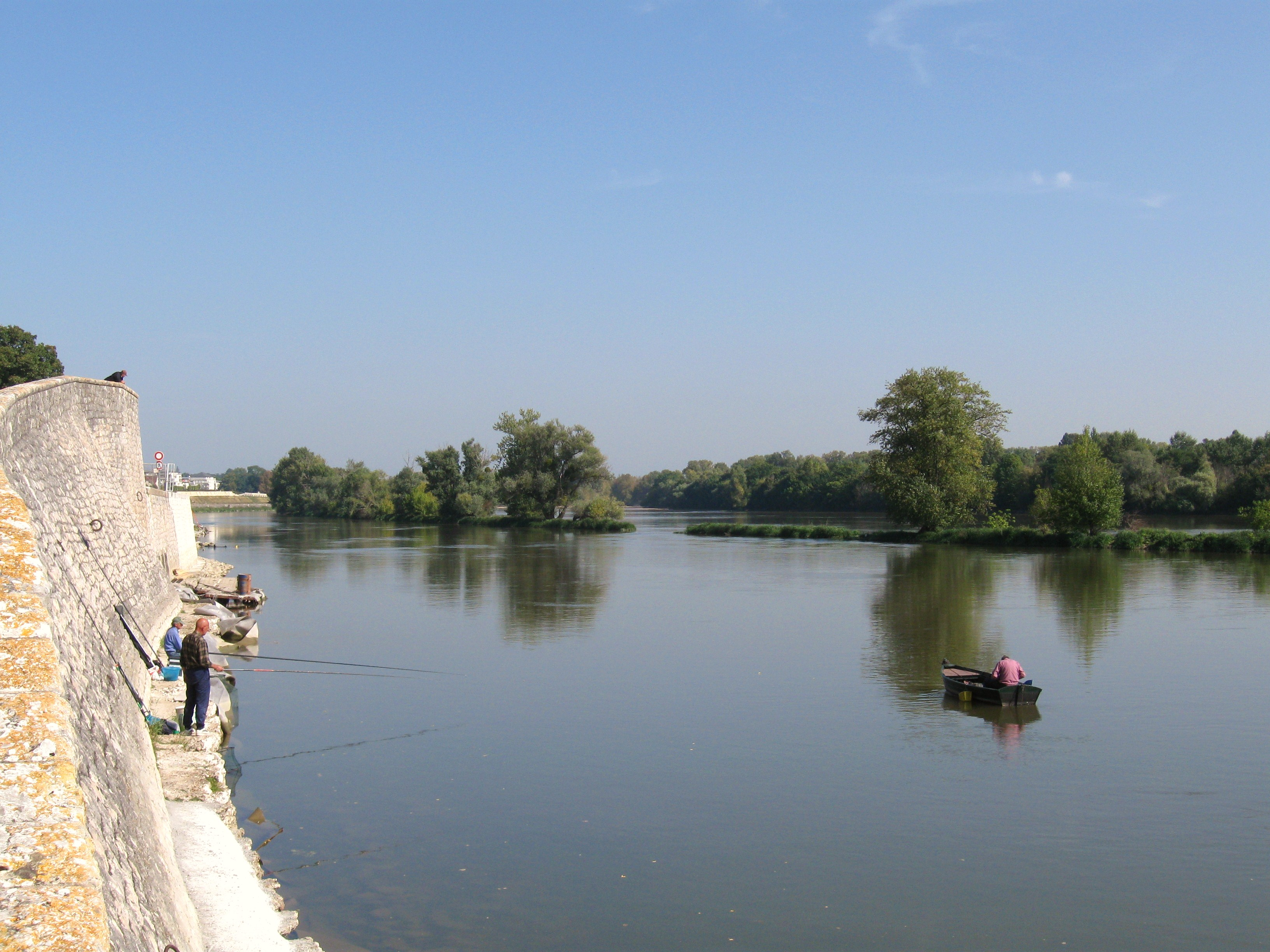 La Loire à Saint-Loup, Saint-Jean-de-Braye, Loiret, France